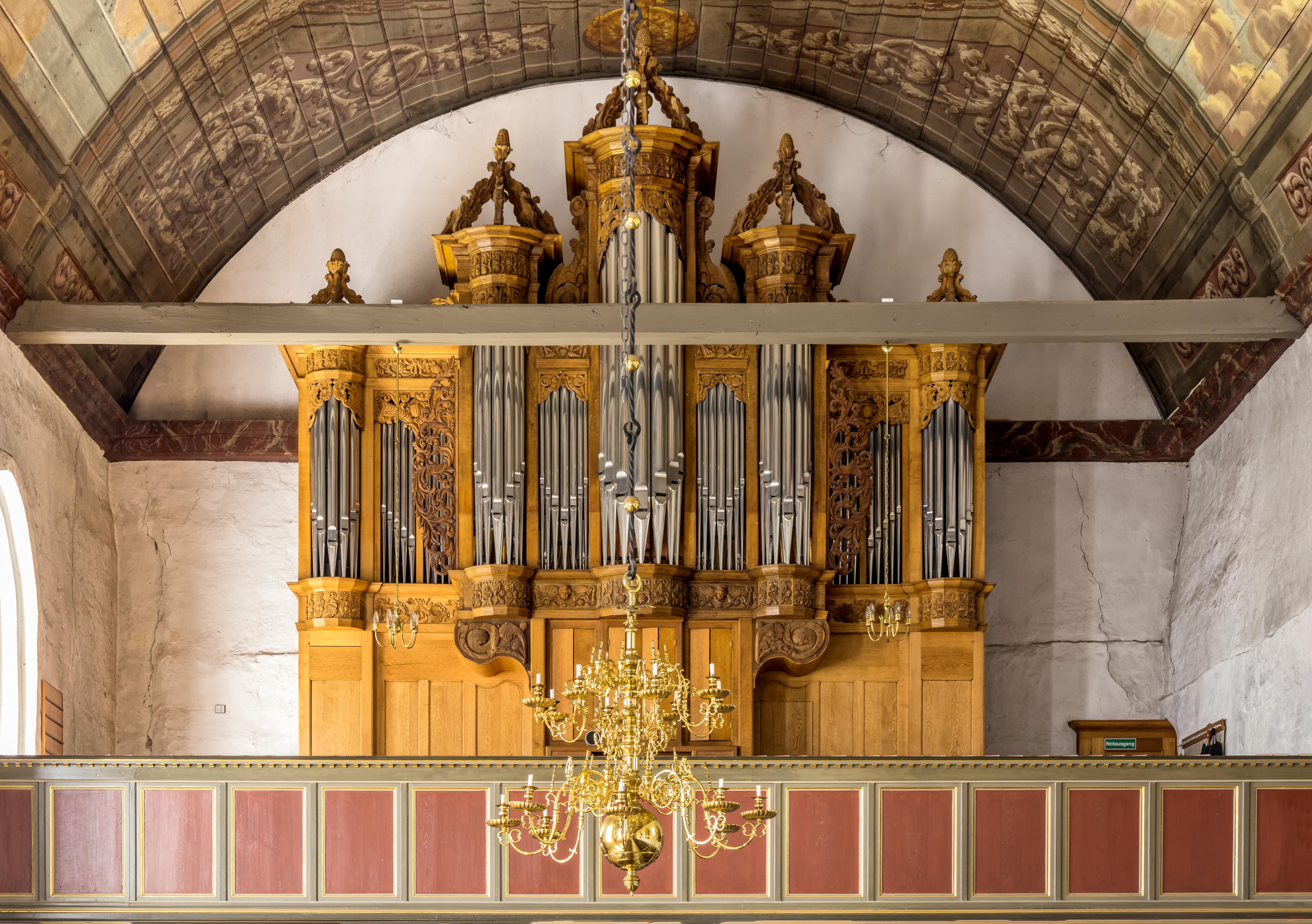 Bilder aus Tönning Die St. Laurentius Kirche in Tönning, Bilder von innen und außen